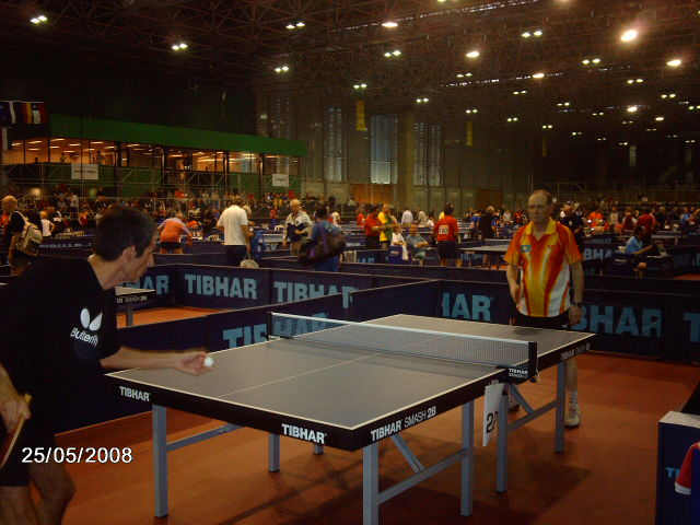 Marcio Tovar (Espanha) enfrentando Valiry Morozov (Kazaquistão) pelo XVI Campeonato Mundial veteranos , Tio, 2008